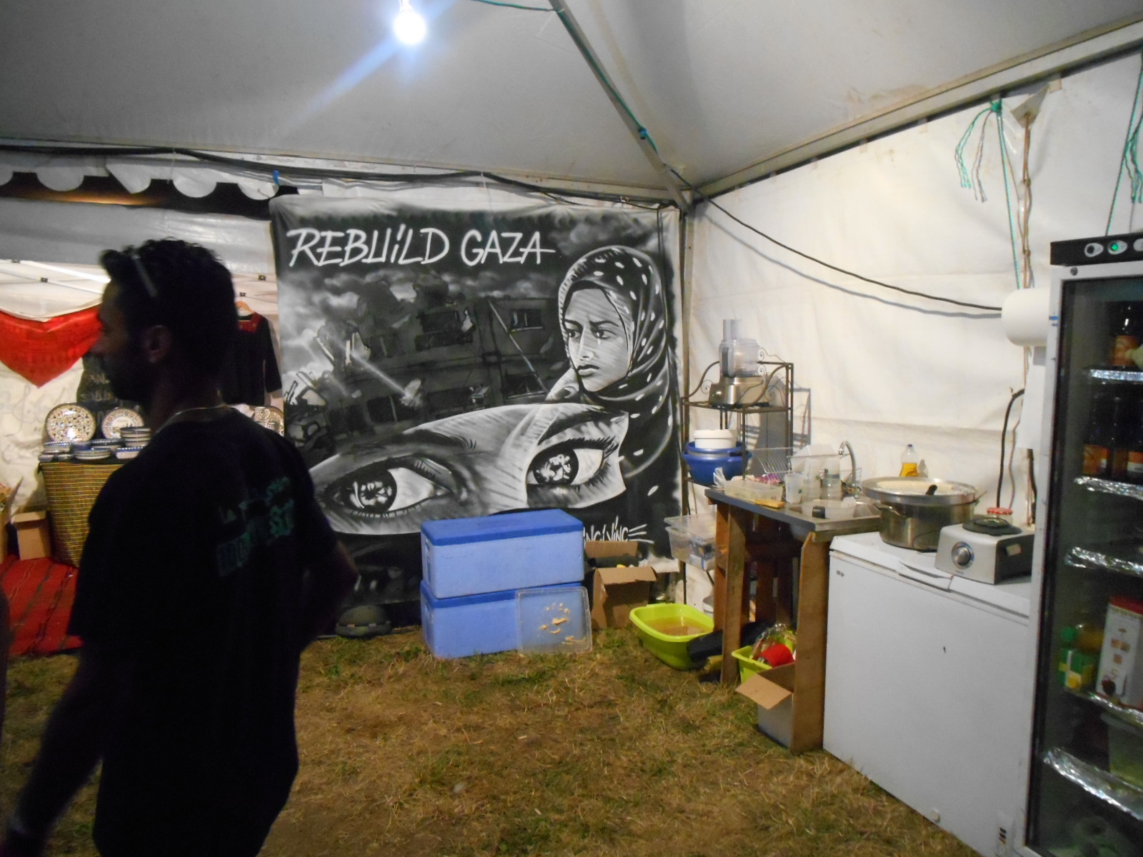 Stand représentant Gaza